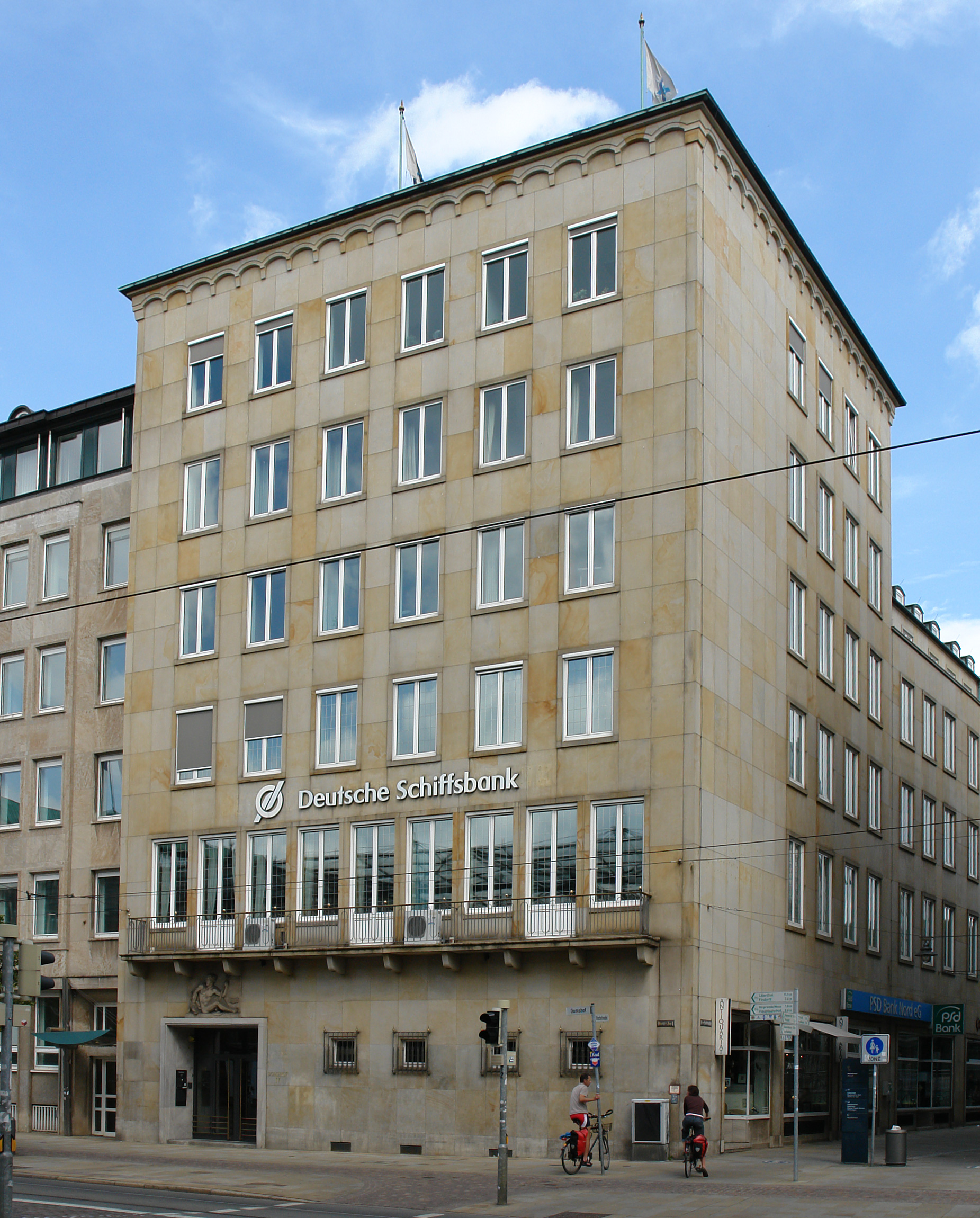 Deutsche Schiffsbank (früher Deutsche Schiffahrtsbank) - Bremen, Domshof 17. Baujahr 1953. Fassade aus Obernkirchner Sandstein Das abgebildete Objekt ist ein geschütztes Kulturdenkmal in der Freien Hansestadt Bremen, mit der Nr. 3424 beim Landesamt für Denkmalpflege registriert. architekturführer-bremen.de